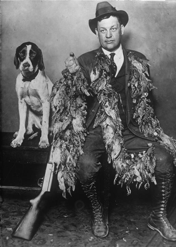 Seltenes Jagdglück! Auf einer Rebhuhnjagd erlegte ein Jäger 80 dieser wohlschmeckenden Vögel. Unser Bild zeigt ihn mit seiner Jagdbeute.